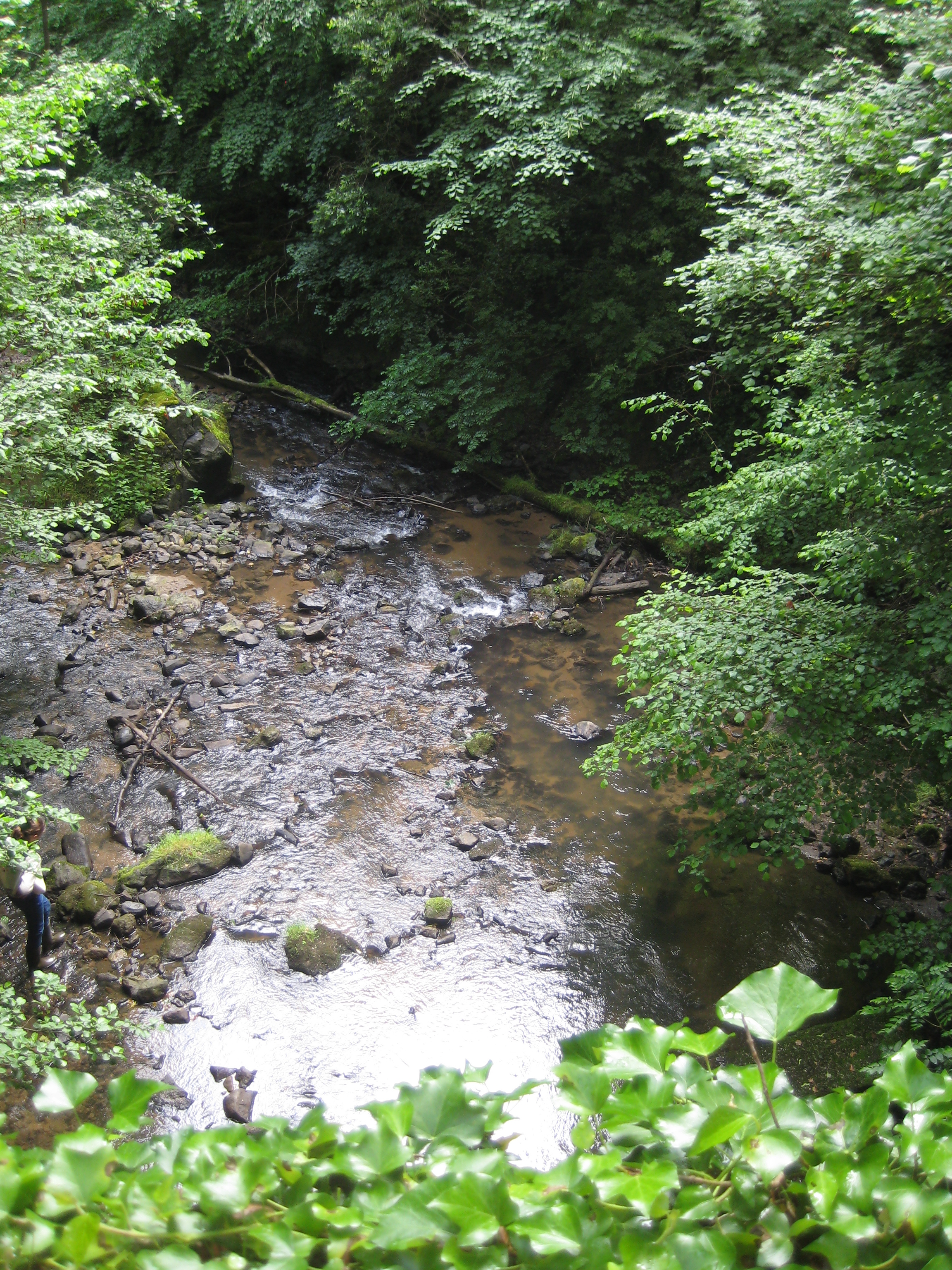 La monne à saint-saturnin, puy de dôme